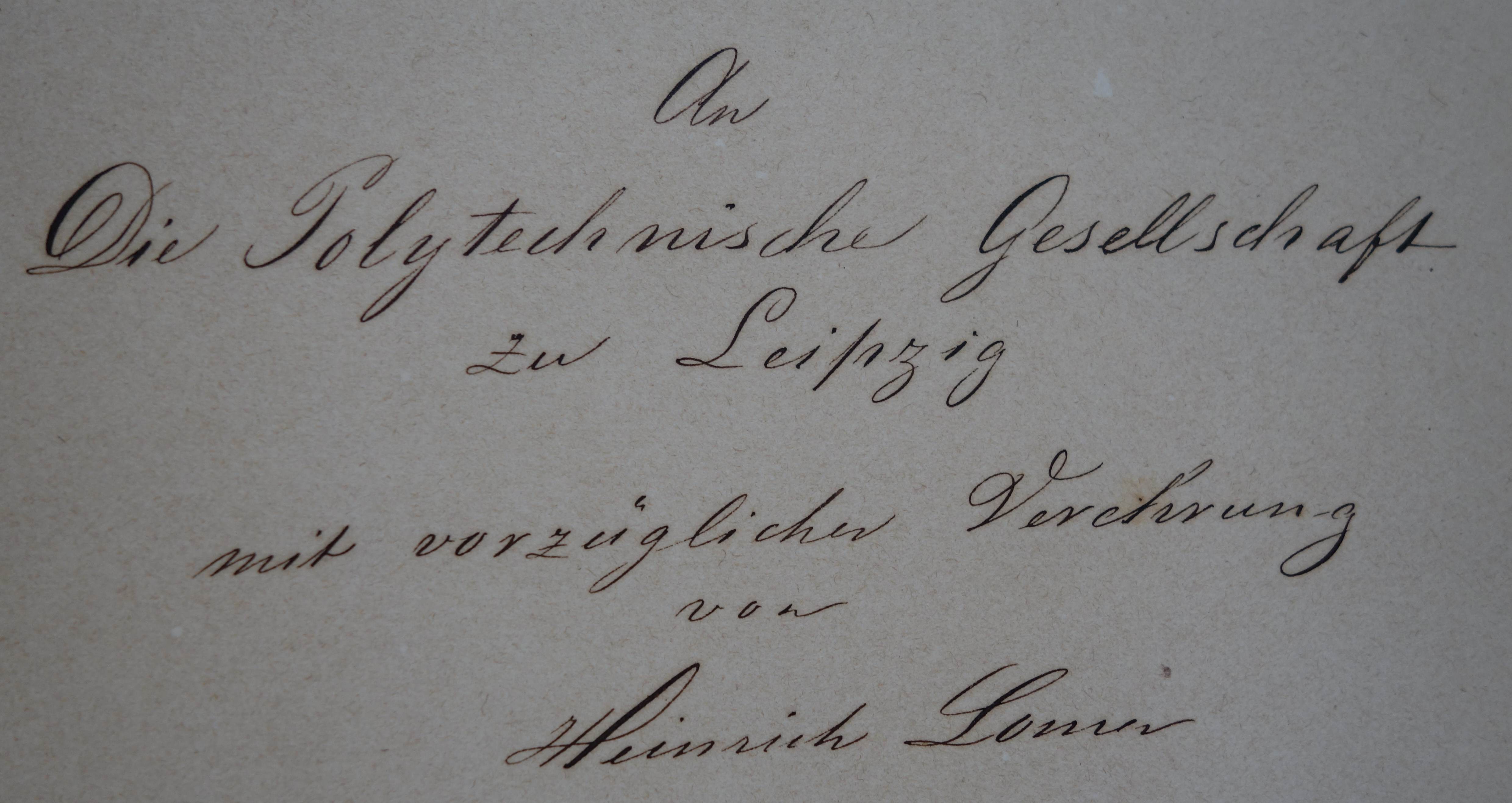 Widmung von Heinrich Lomer in seinem Buch, für die Polytechnische Gesellschaft zu Leipzig. Mit dem Buch „Der Rauchwaaren-Handel“ schuf der Rauchwarenkaufmann Lomer das erste umfassende Werk über den Weltpelzhandel.